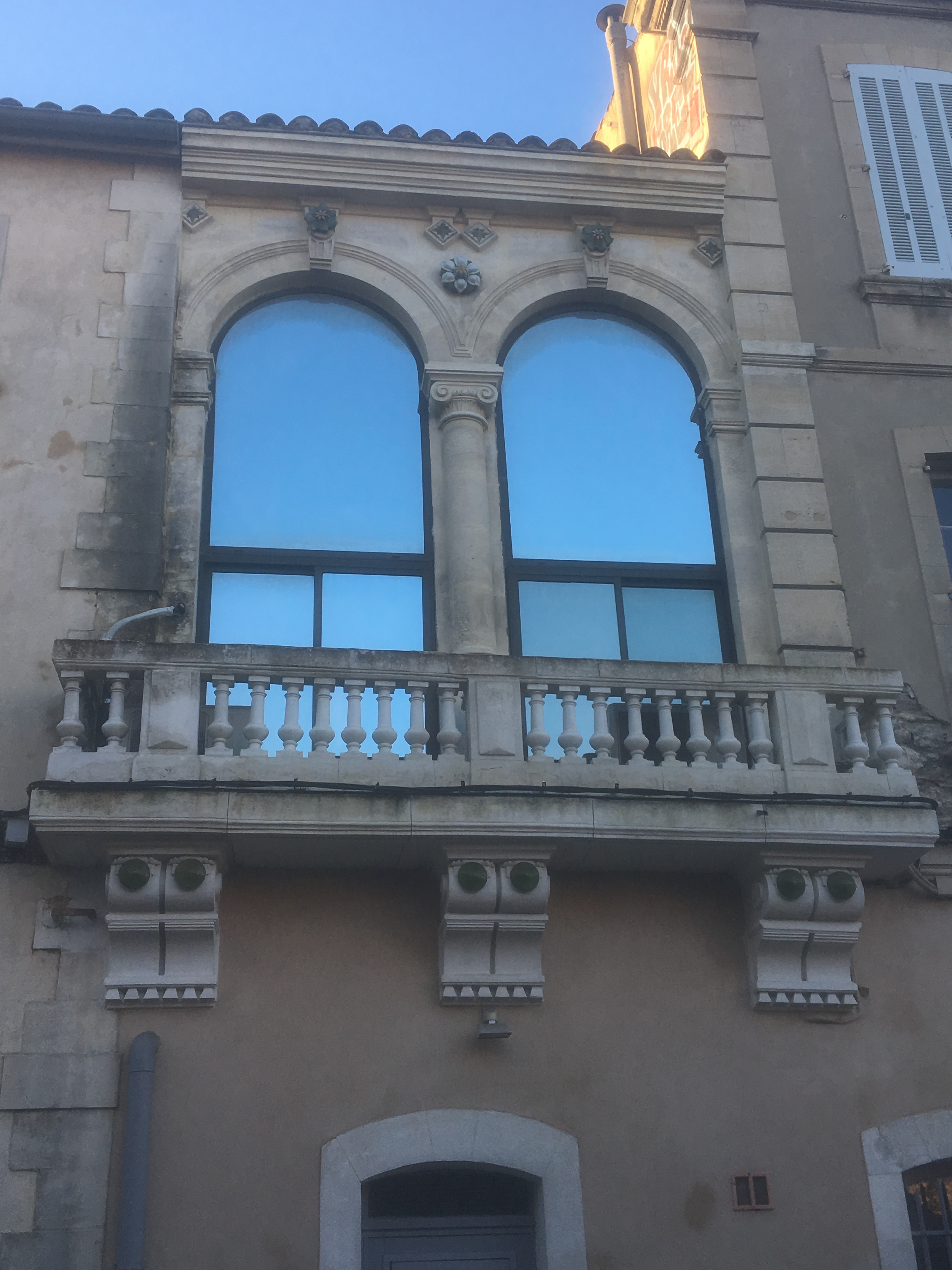 Balcon sculpté par Lucien Vernet Rue Guillaume Puy XIXè siècle